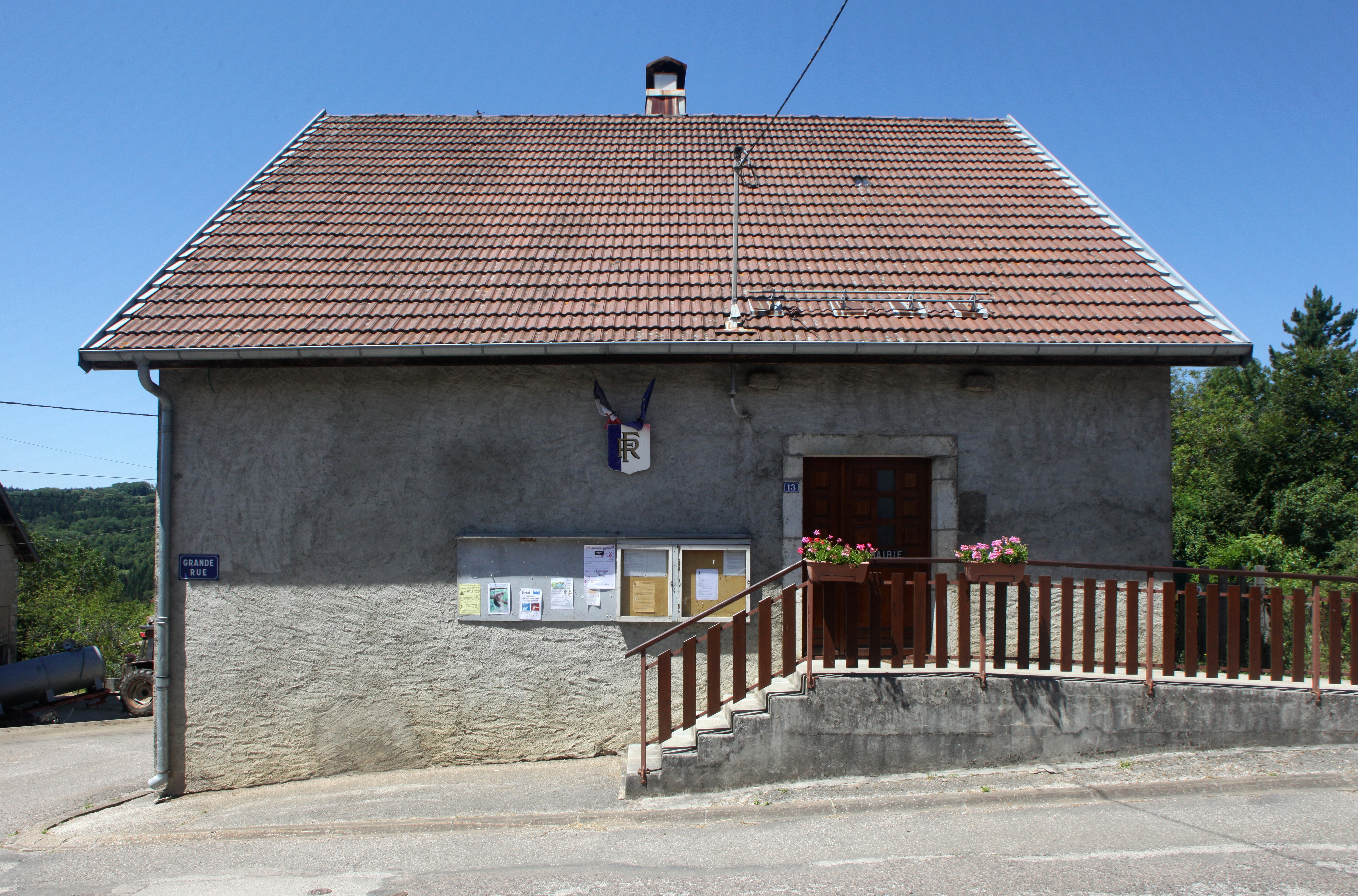 Mairie de Conte (Jura).